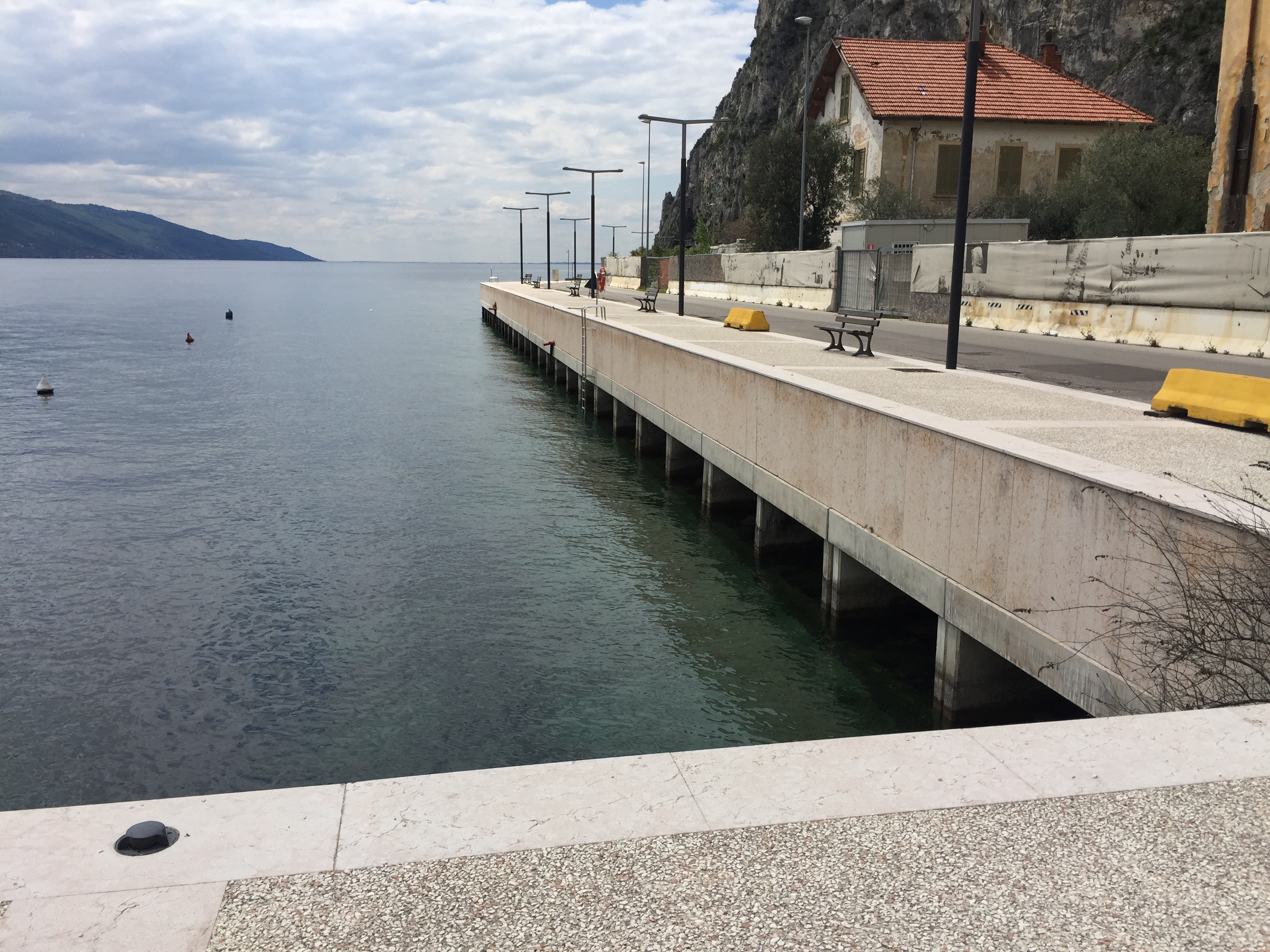 Ungenutzter Yachthafen von Campione, 05/2016